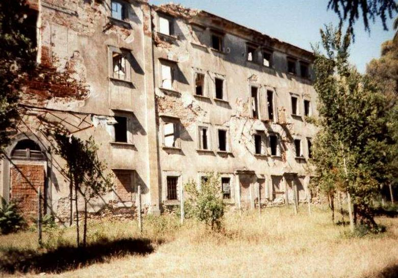 Livorno: la Villa Maurogordato ridotta da decenni allo stato di rudere a causa del disinteresse della collettività. La villa infatti non fu colpita dai bombardamenti della seconda guerra mondiale ma fu depredata nel tempo e mai restaurata.